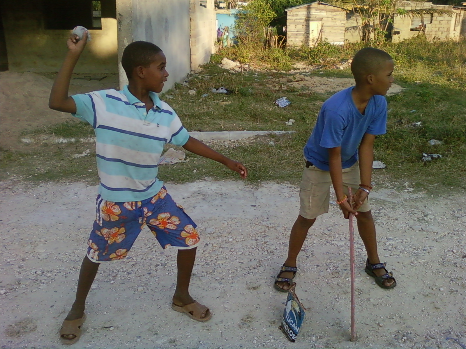 Niños jugando la plaquita